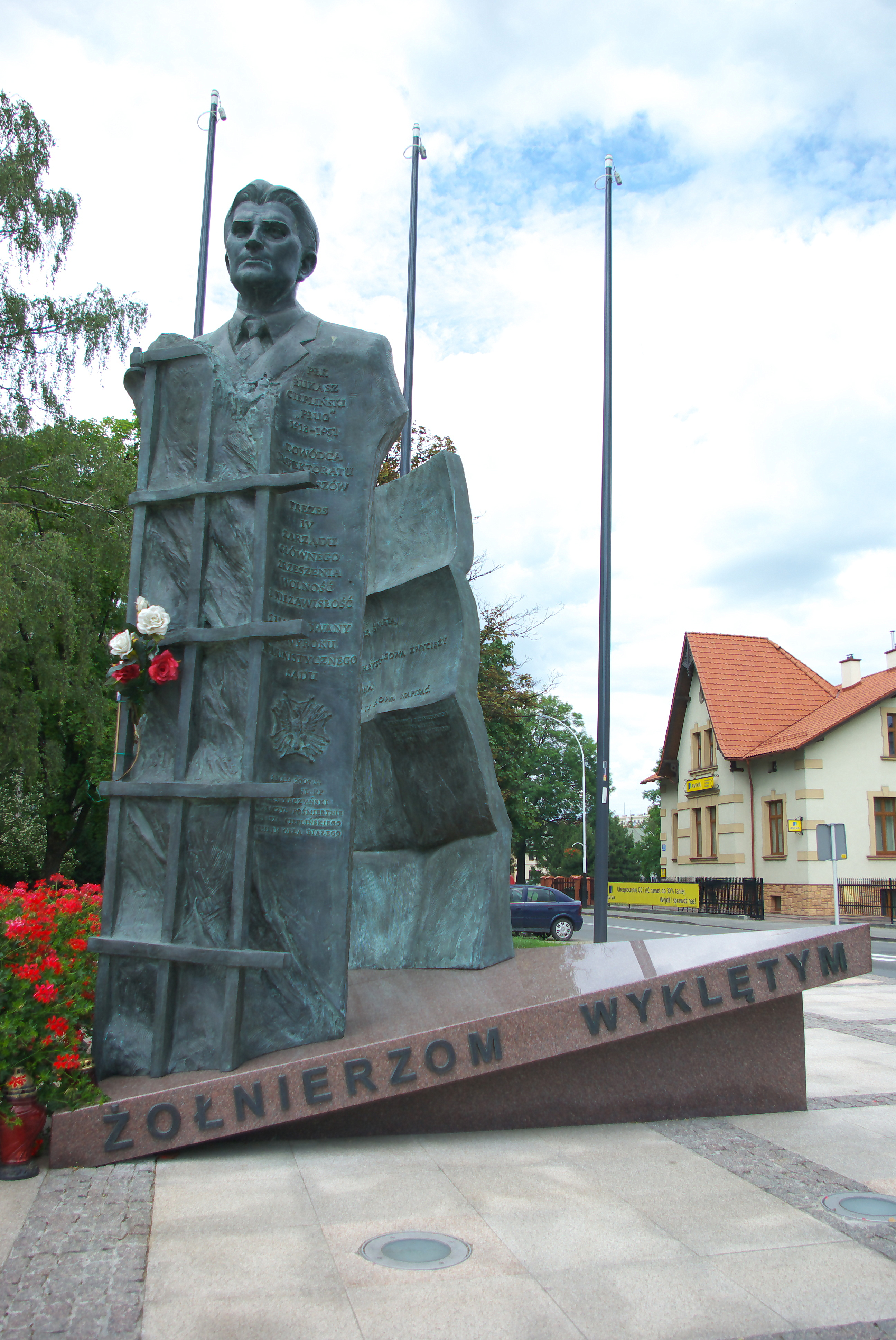 Pomnik Żołnierzy Wyklętych w Rzeszowie przy Alei Łukasza Cieplińskiego. Upamiętniony Łukasz Ciepliński